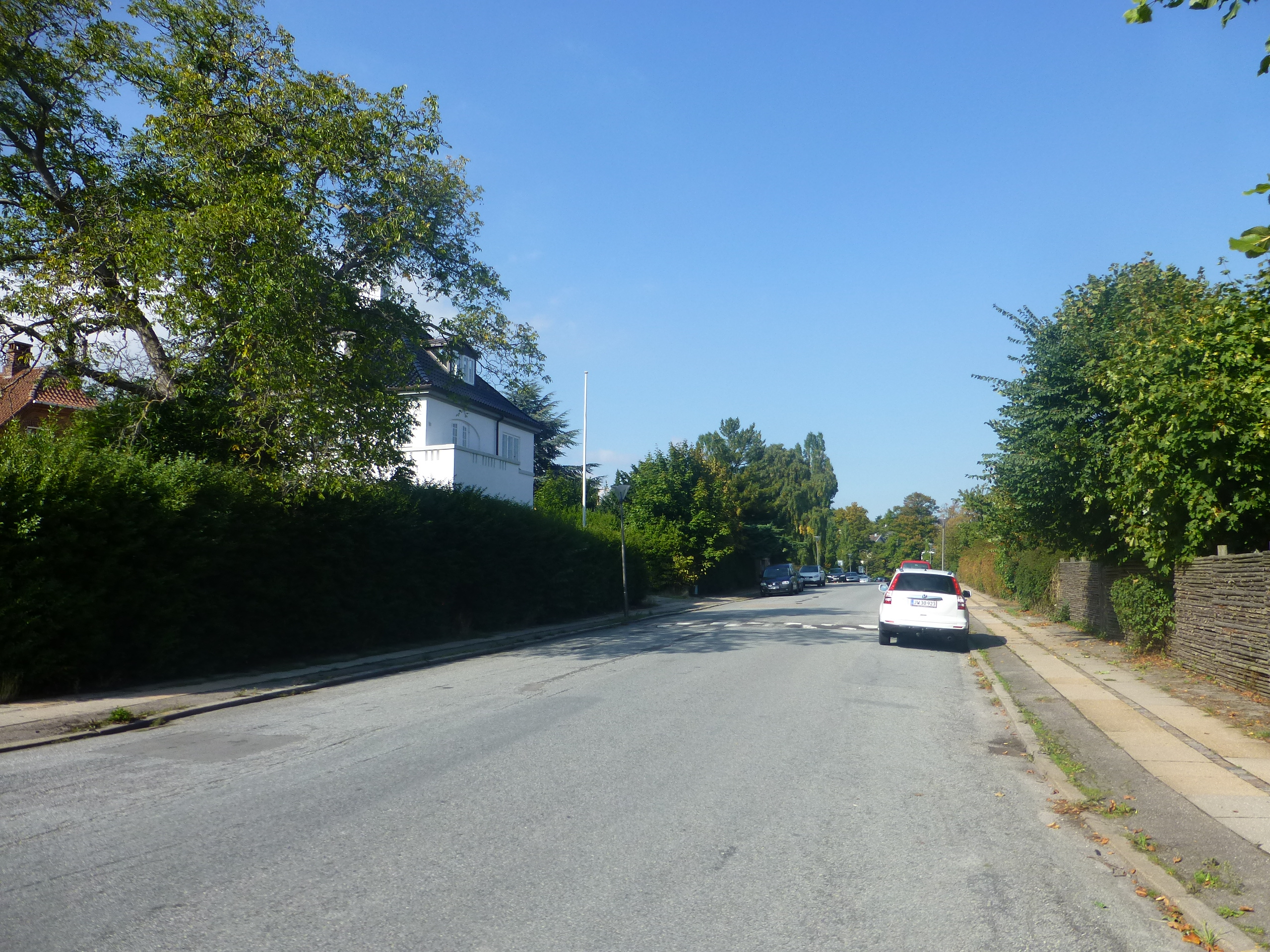 The street Lundevangsvej in Hellerup in Copenhagen.